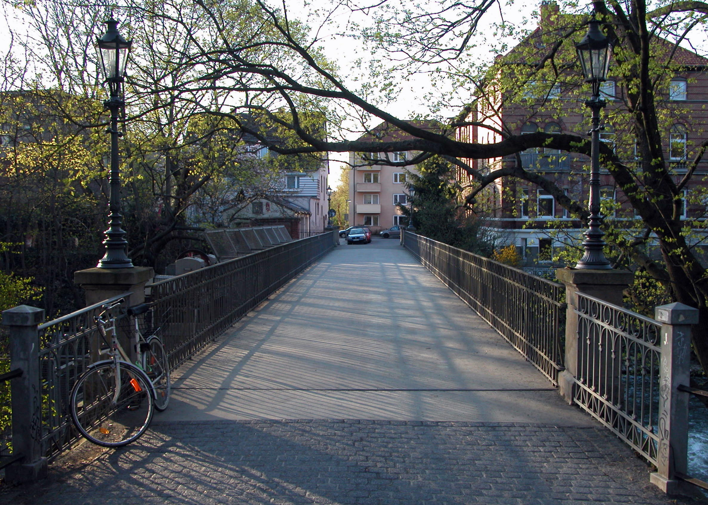 Braunschweig: Wehr-Brücke von Südosten gesehen.